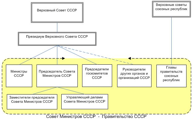 Состав и подчиненность Совета Министров высшим органам государственной власти